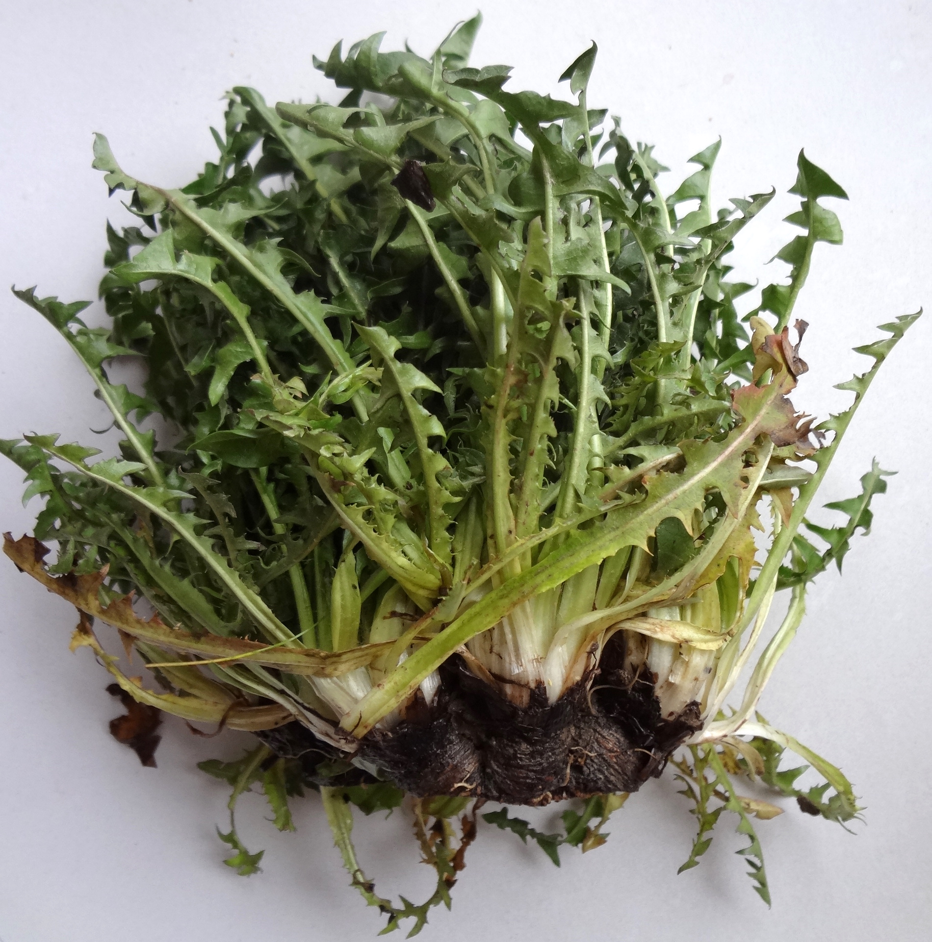 Botte de dent-de-lion trouvée dans la distribution hebdomadaire des Jardins de Cocagne (Genève), fin mars 2015. Destinée donc à être mangée en salade.